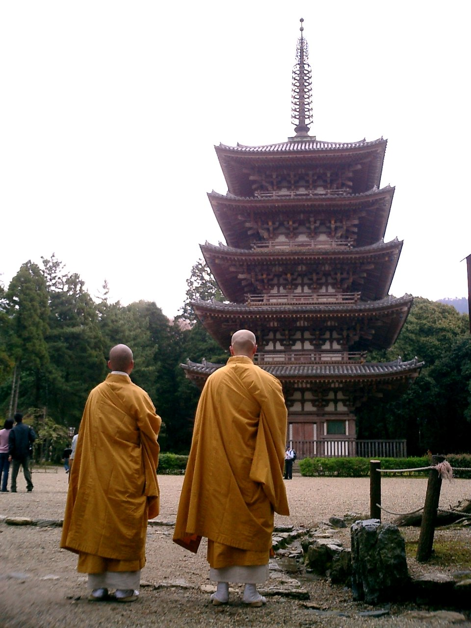 Daigoji-temple Gjunoto-tower